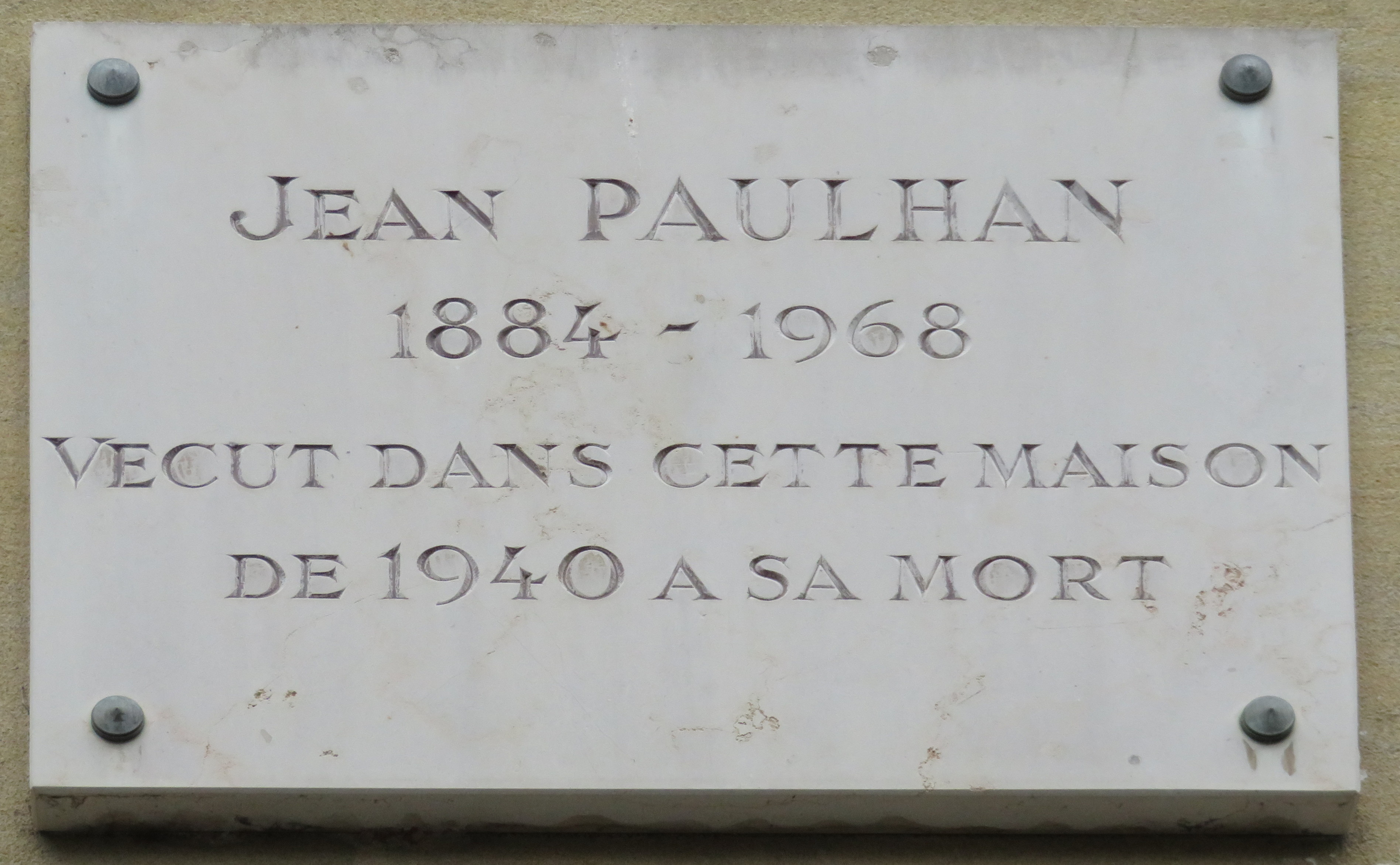 Plaque commémorative, 5 rue des Arènes, Paris « Jean Paulhan 1884 ~ 1968 Vécut dans cette maison de 1940 à sa mort »